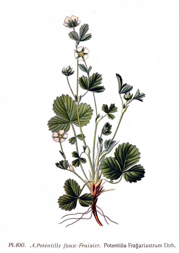 Potentilla fragariastrum Ehrh.